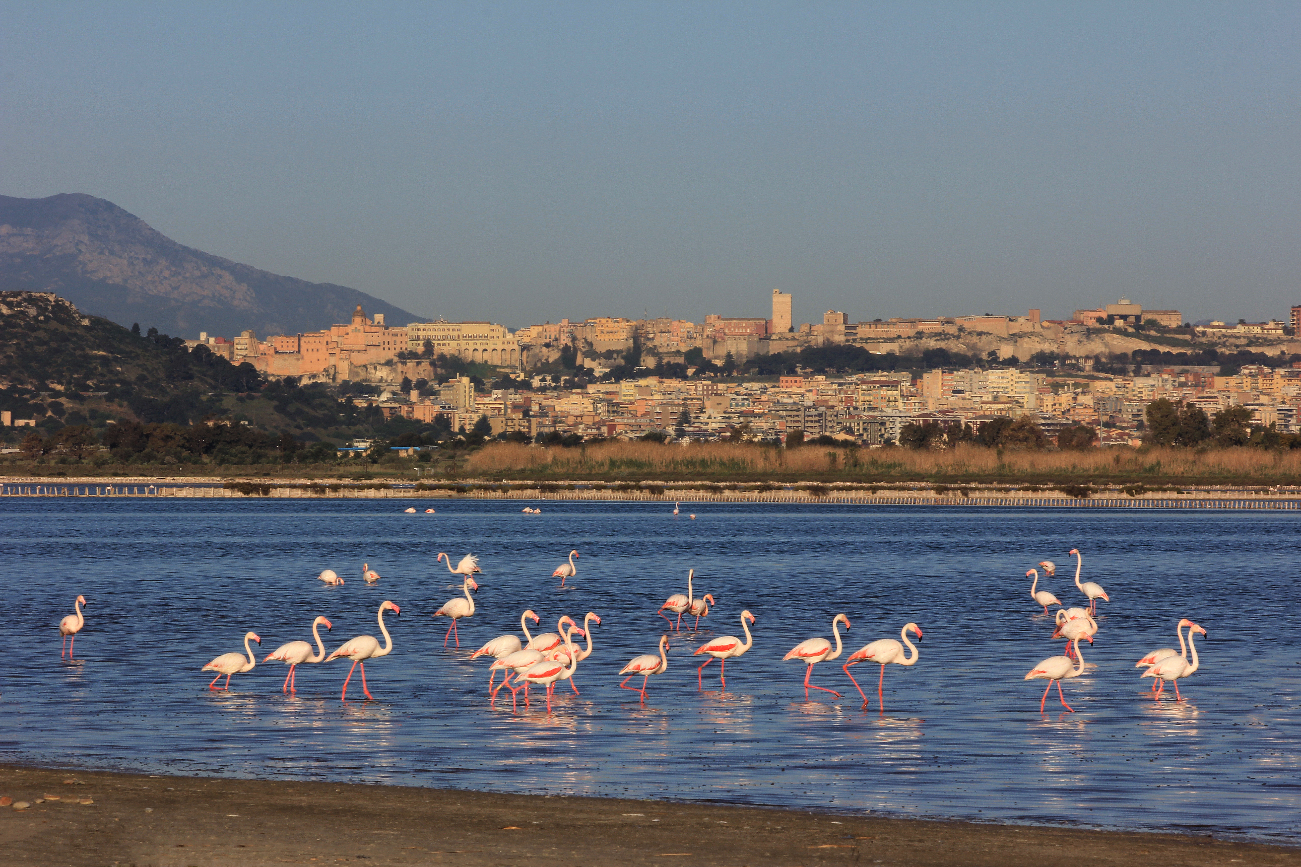 Panorama della città di Cagliari dallo stagno di Molentargius, con fenicotteri rosa in primo piano